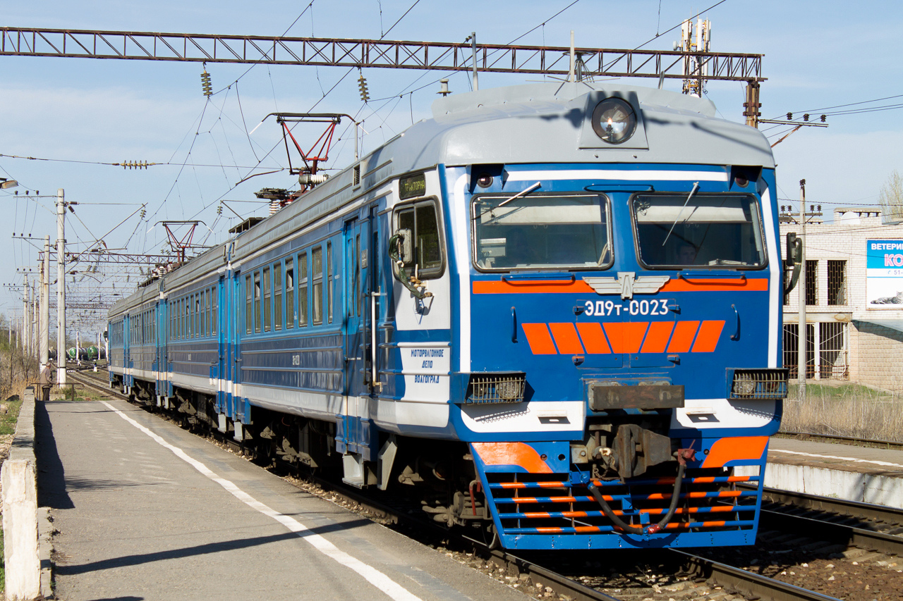 С завода поступила в ТЧ-14 Анисовка 09.2002 г. передали в ТЧ-8 Волгоград 03.2017 г. передан в ТЧ-14 Анисовка Электропоезд построен в 8-вагонной составности (вагоны 01-04, 07-10) Эксплуатируется в составе 01-02-04-03-08-09 С сентября 2015 г. носит именное название "Россия"